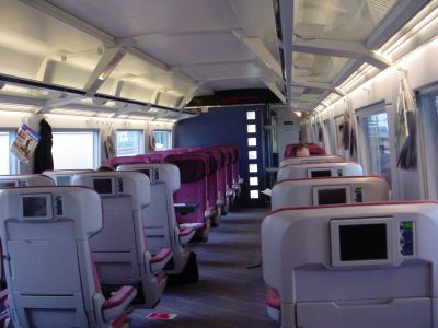 ICE2 (1. Klasse Großraumwagen)